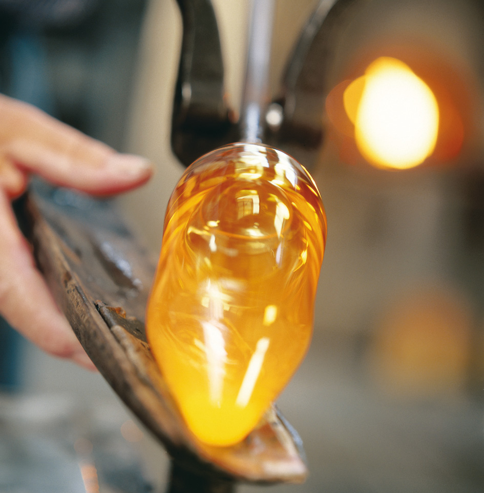 Handfertigung von Kristallgläser beim Kristallglashersteller ZWIESEL KRISTALLGLAS